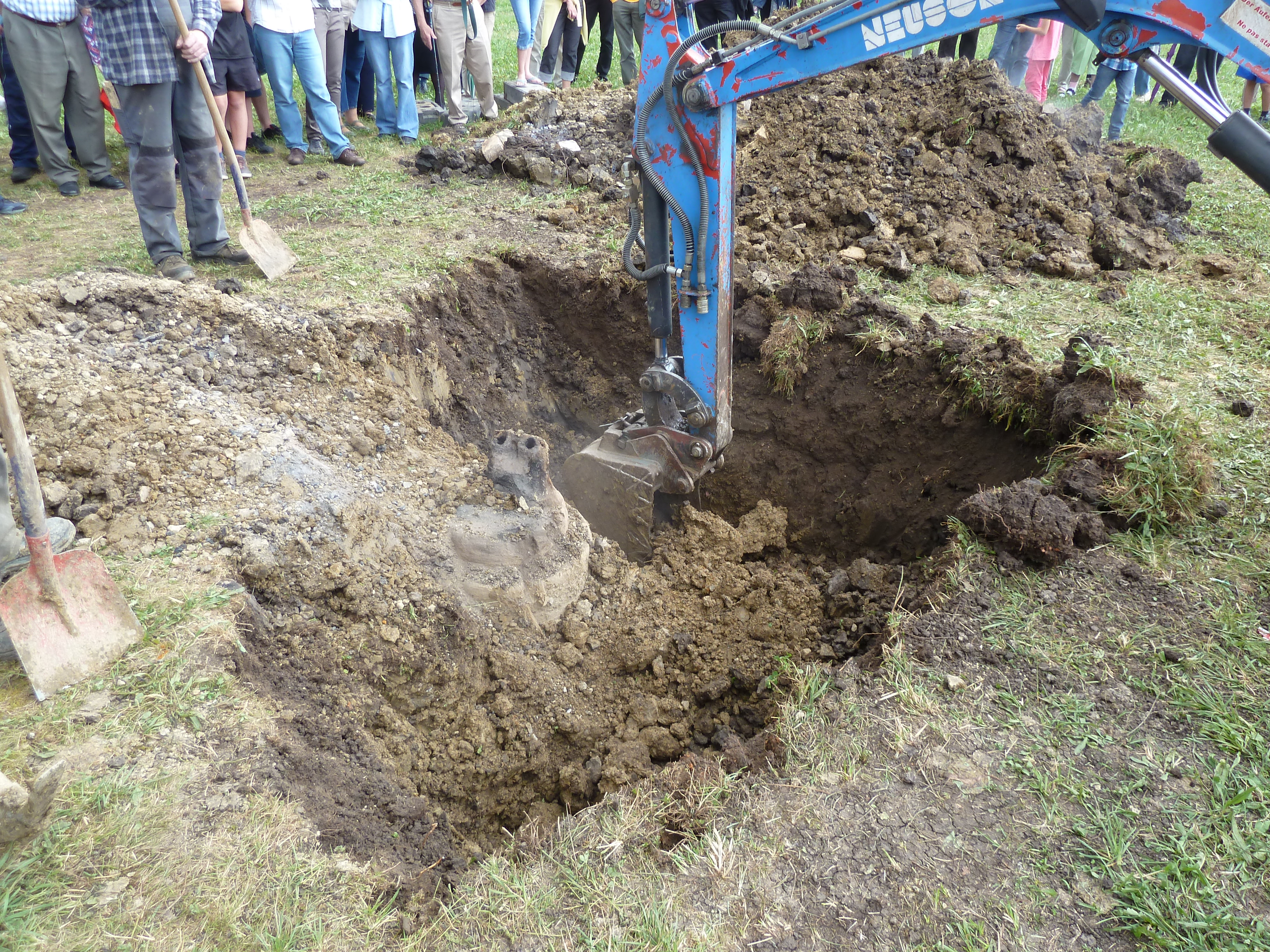 Glockenguss in Ewattingen mit Bruder Michael Reuter von der Abtei Maria Laach